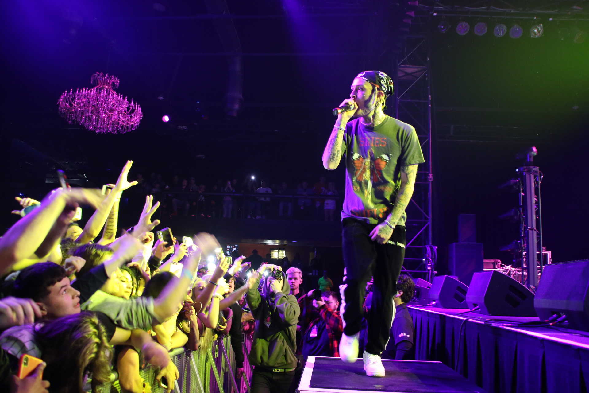 Lil Skies ::: Fillmore Auditorium ::: 05.01.19